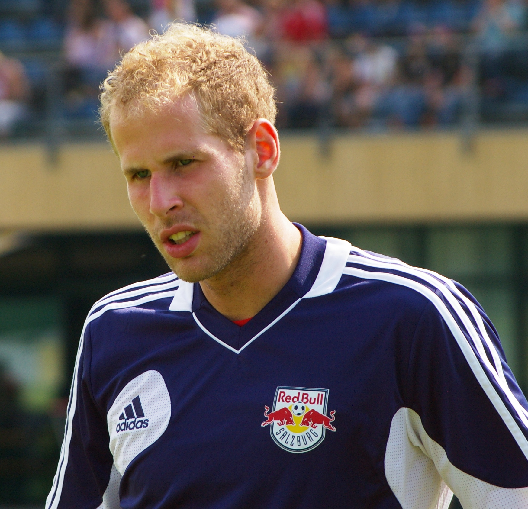 Torhüter FC Red Bull Salzburg